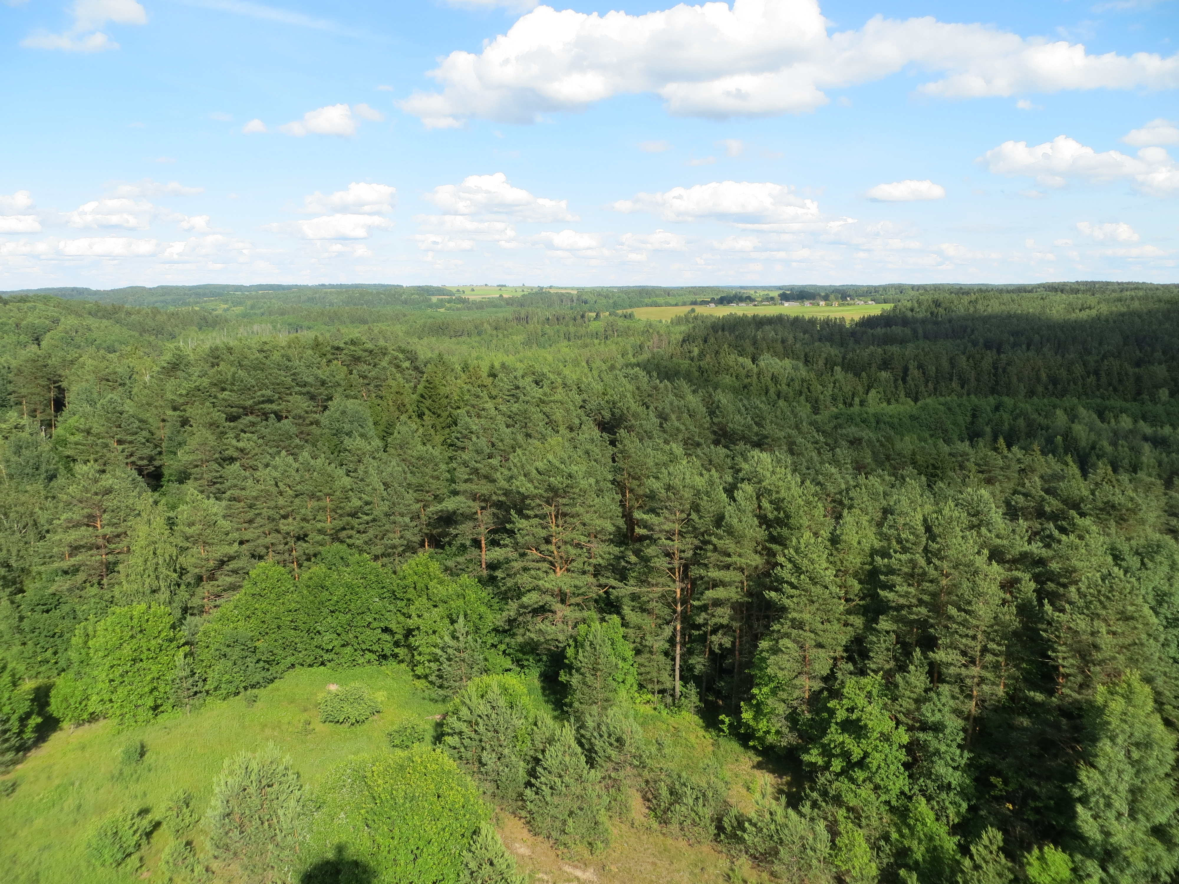 Šiliniai, Lithuania